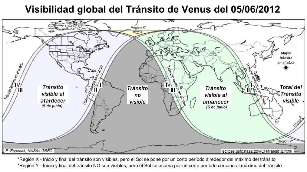 Gráfico que muestra los lugares desde los que fue visible el tránsito de Venus los días 5 y 6 de junio de 2012